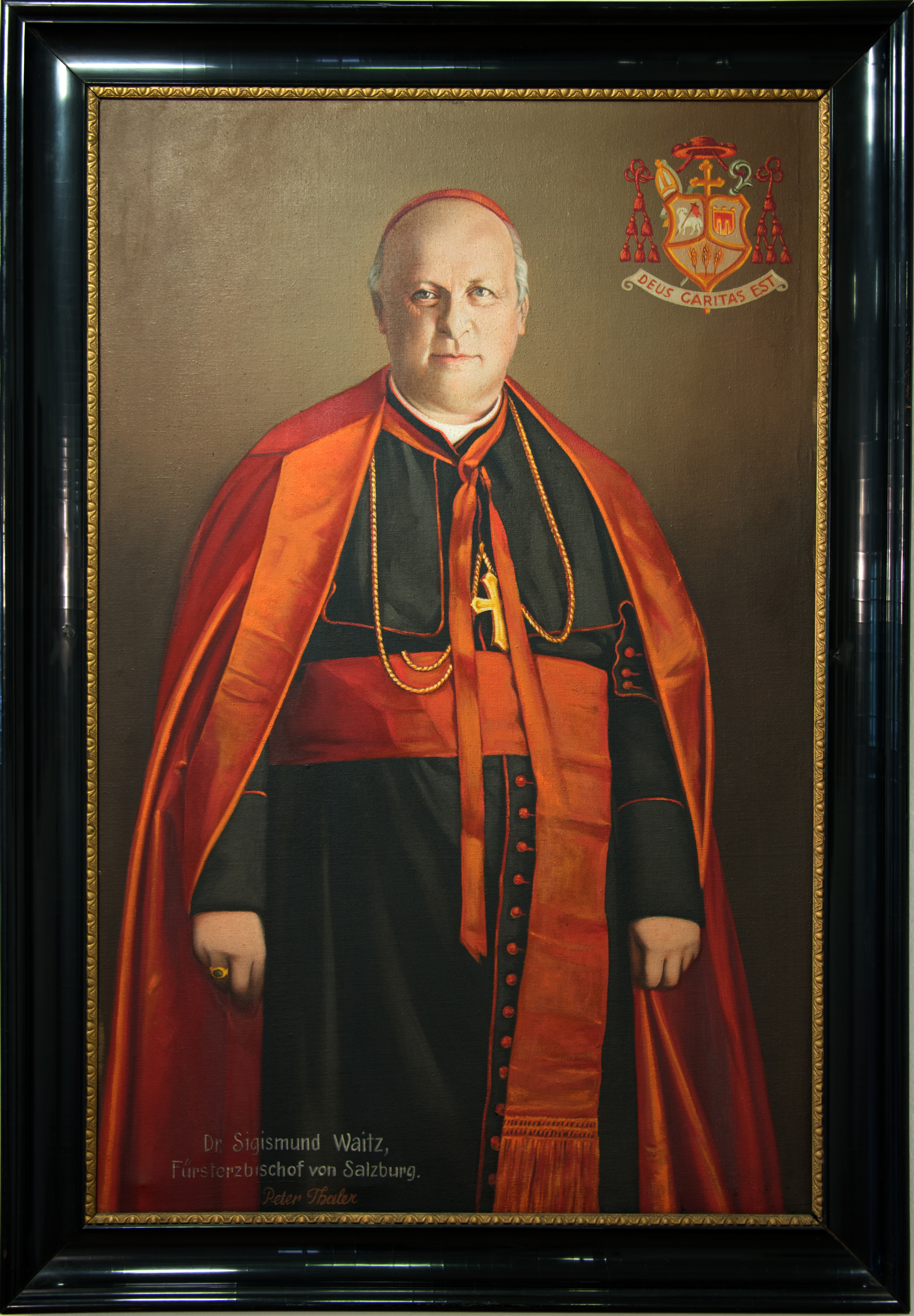 Der Fürsterzbischof von Salzburg Dr. Sigismund Waitz, Portrait von Peter Thaler